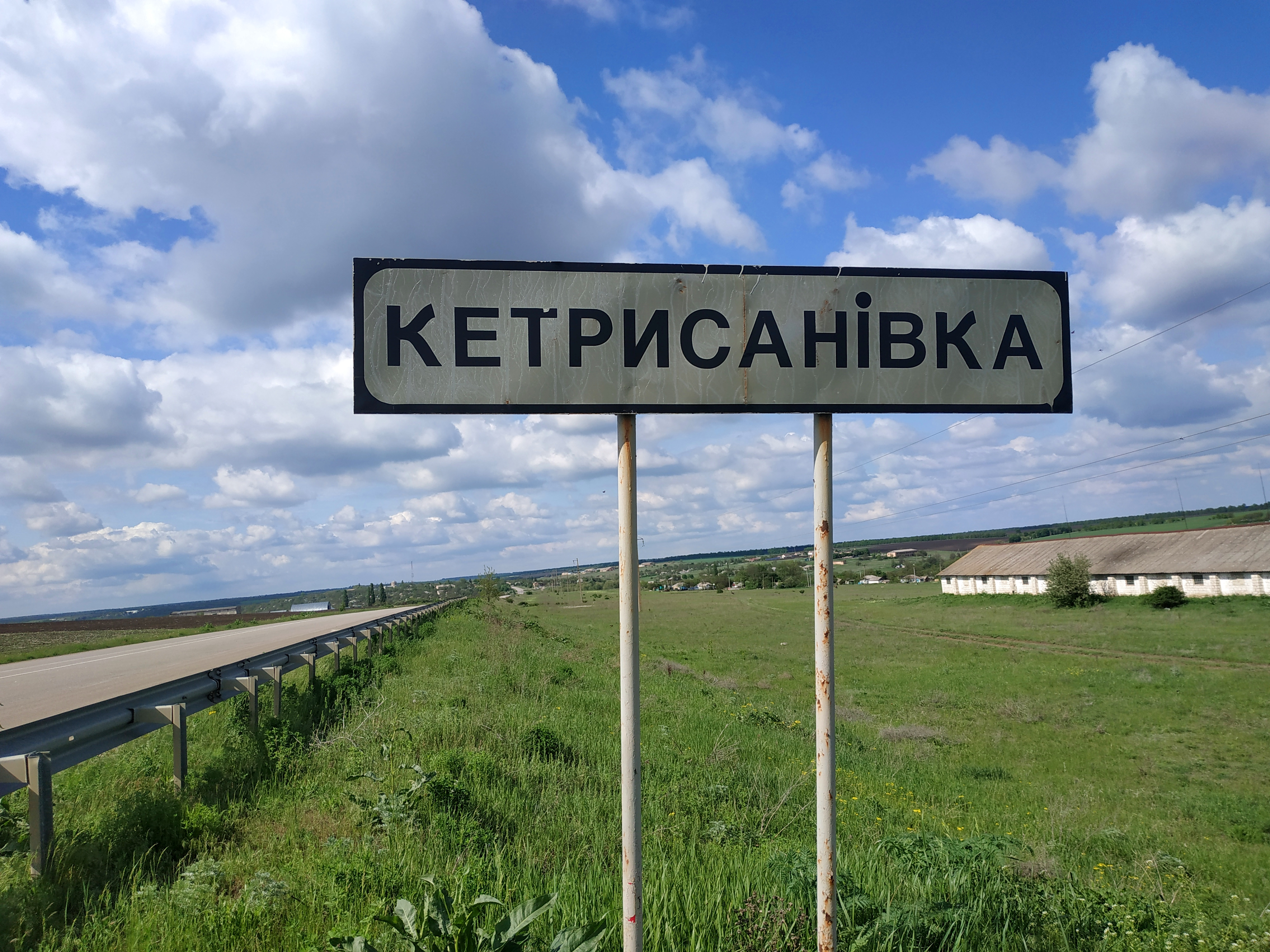 В'їзд у село